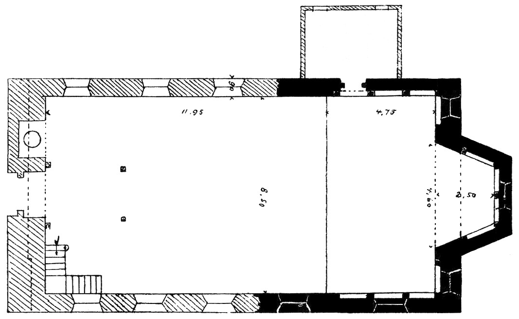 Grundriss der Kirche St. Martinus in Solingen-Burg